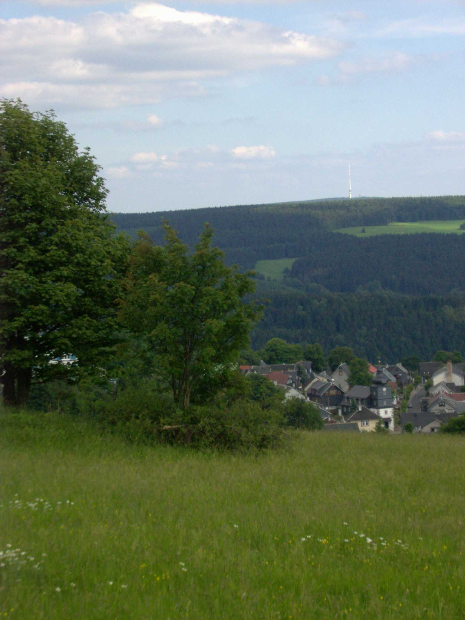 Blick vom Simmersberg (781m) auf Schnett, den Grendel (787m) und den Bleßberg (865m, Antenne)